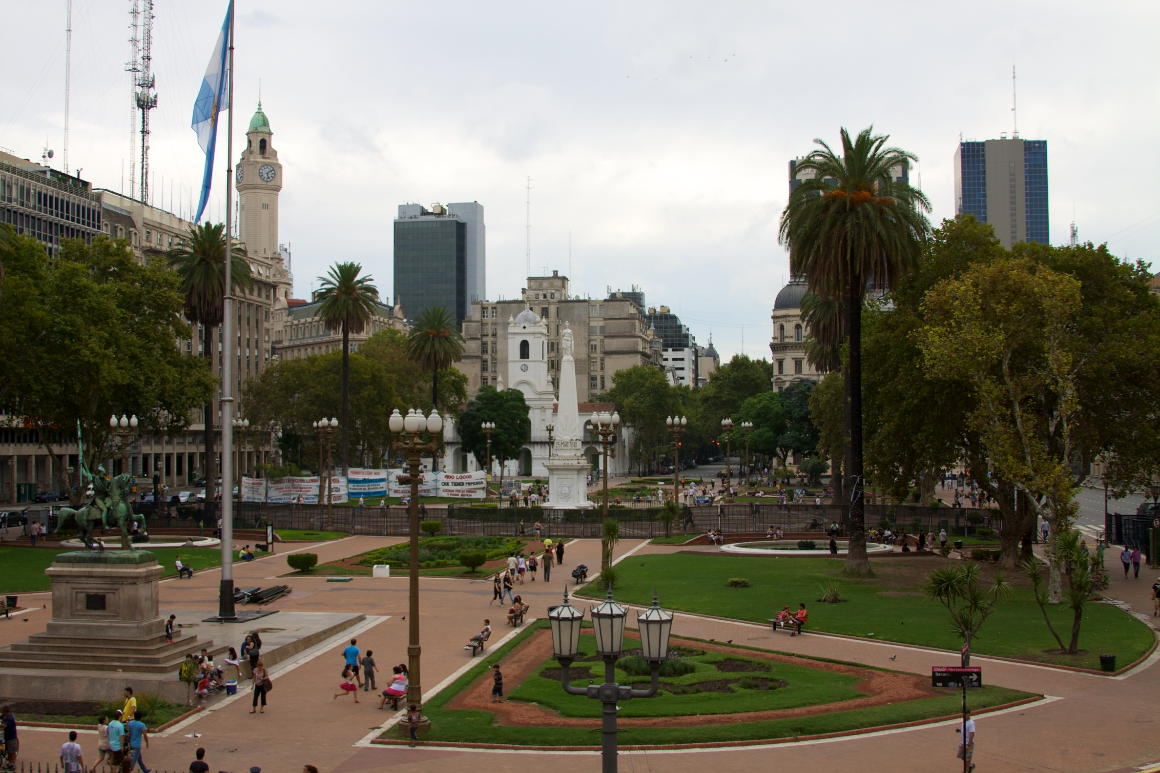 Argentina - Buenos Aires 039 - Casa Rosada & the Plaza de Mayo